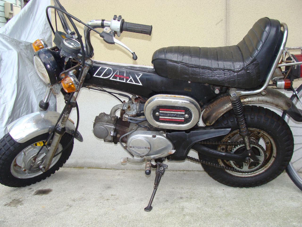 DAX mini chopper Honda Dax ST50-M